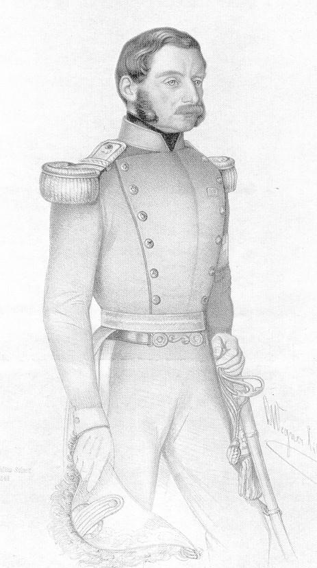 Oberst Eduard Ziegler (1800–1882), 1837–40 Stadtpräsident von Zürich. Porträt aus dem 19. Jahrhundert